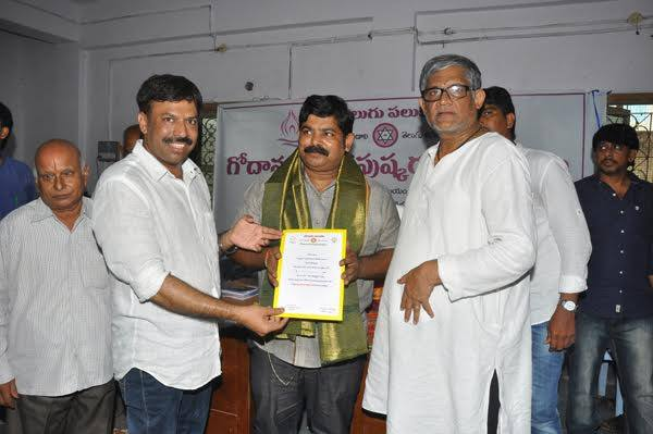 తనికెళ్ళ భరణి గారి చేతుల మీదుగా సన్మానం